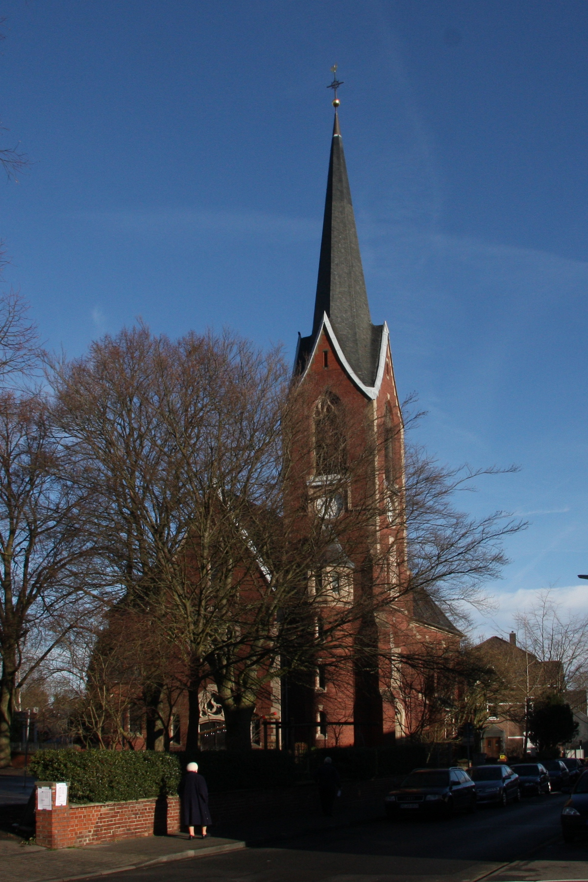 Baudenkmal Herzogenrath, Kath. Pfarrkirche St. Josef, Josefstraße 6